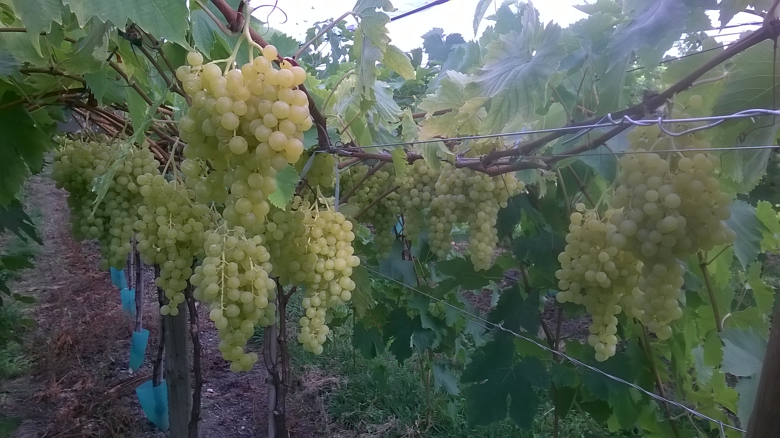 Voici du Chasselat de moissac cultuvé en système T-Bord